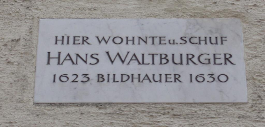 Tafel zur Erinnerung an den Bildhauer Hans Waldburger (um 1570-um 1630) in Salzburg, Chiemseegasse 5